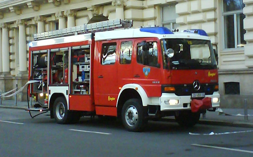 Vatrogasna kola Zagreb